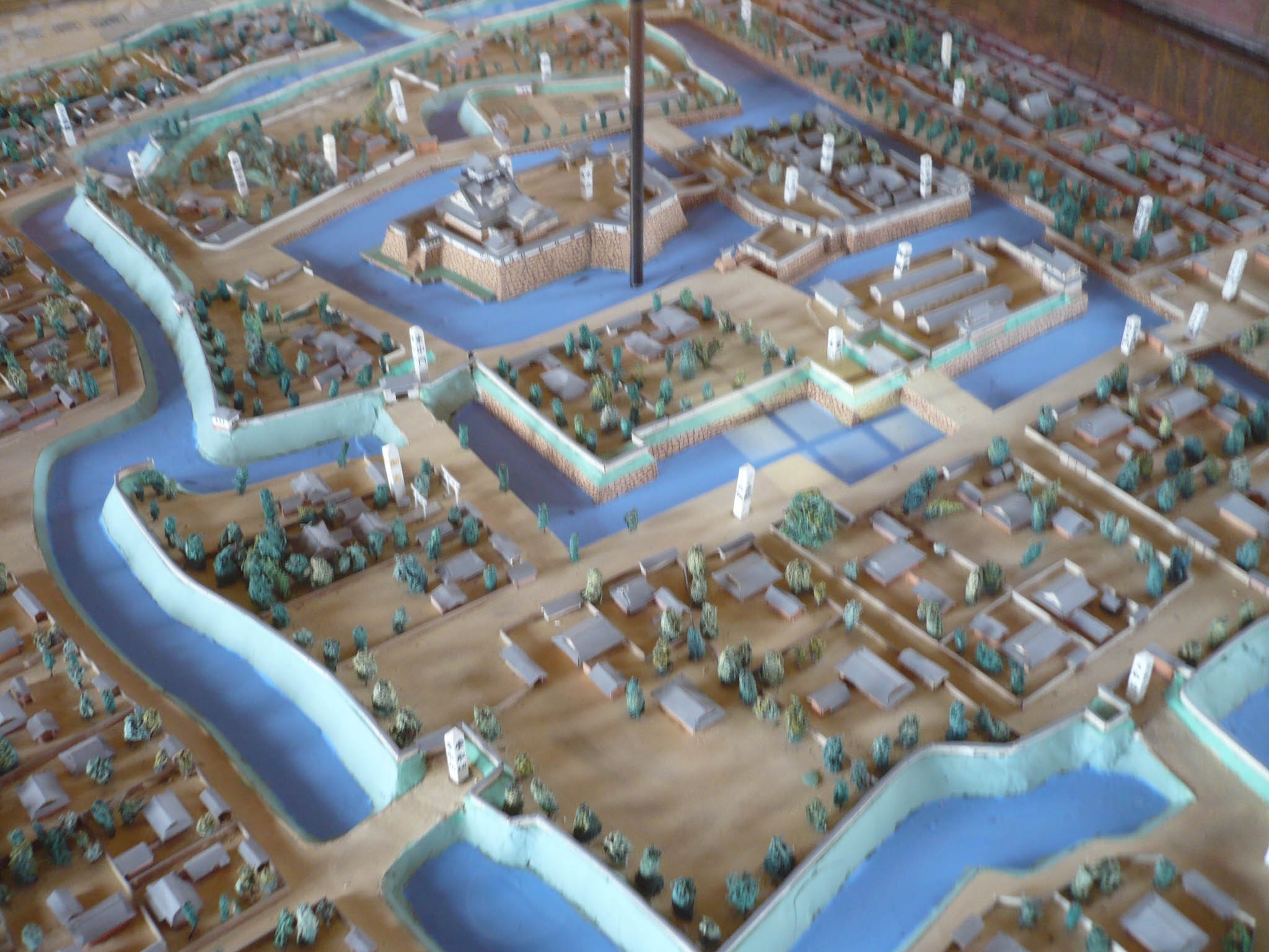 岸和田城の復興天守模型